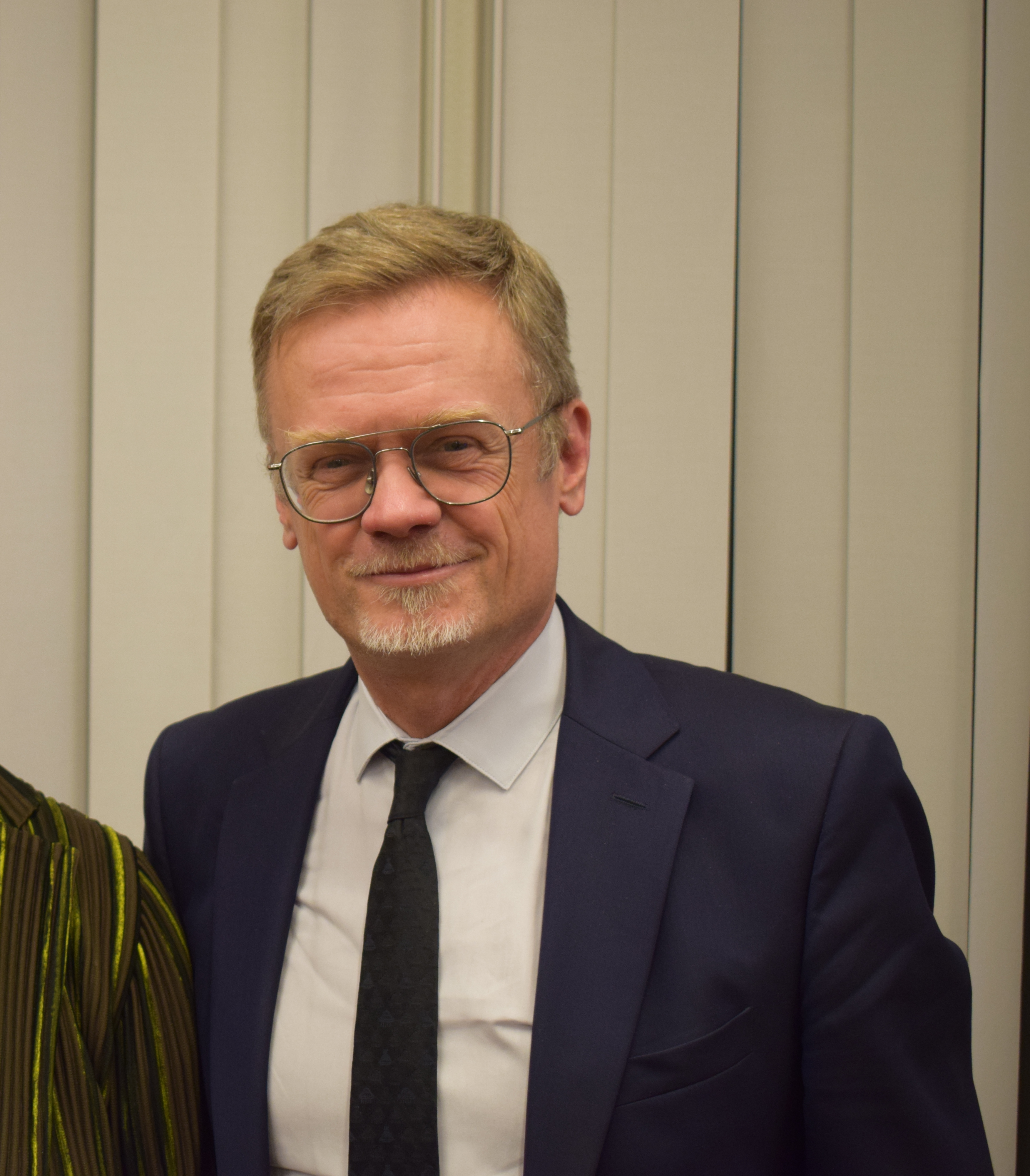 Laurent Pic, ambassadeur de France au Japon, à l'apéritif de bienvenue pour 3 sénateurs en visite, organisé par l'association Français du Monde (ADFE Tokyo)